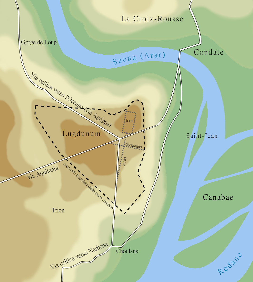 Tracciato presunto delle mura cittadine e delle vie di accesso alla colonia romana di Lugdunum (43 a.C.) secondo Amable Audin, indicazioni geografiche secondo Grégoire Ayala, relative al I secolo d.C.